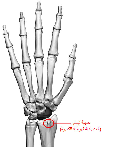 اليد اليسرى ، حديبة ليستر أو الحديبة الظهرانية للكعبرة Left hand , Lister's tubercle or dorsal tubercle of radius